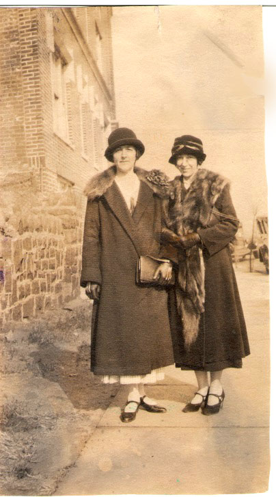 Студентки женского медицинского института Санкт-Петербурга Антонина Алексеевна Шорохова и Марта Людвиговна Нобель-Олейникова, до 1909 года